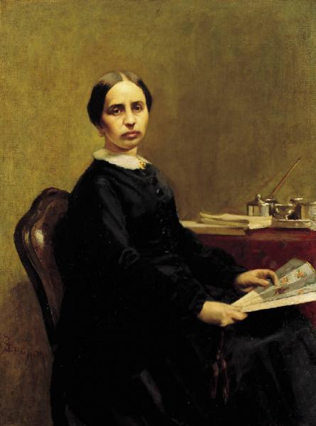 Opera di Amero Cagnoni presso la provincia di Milano